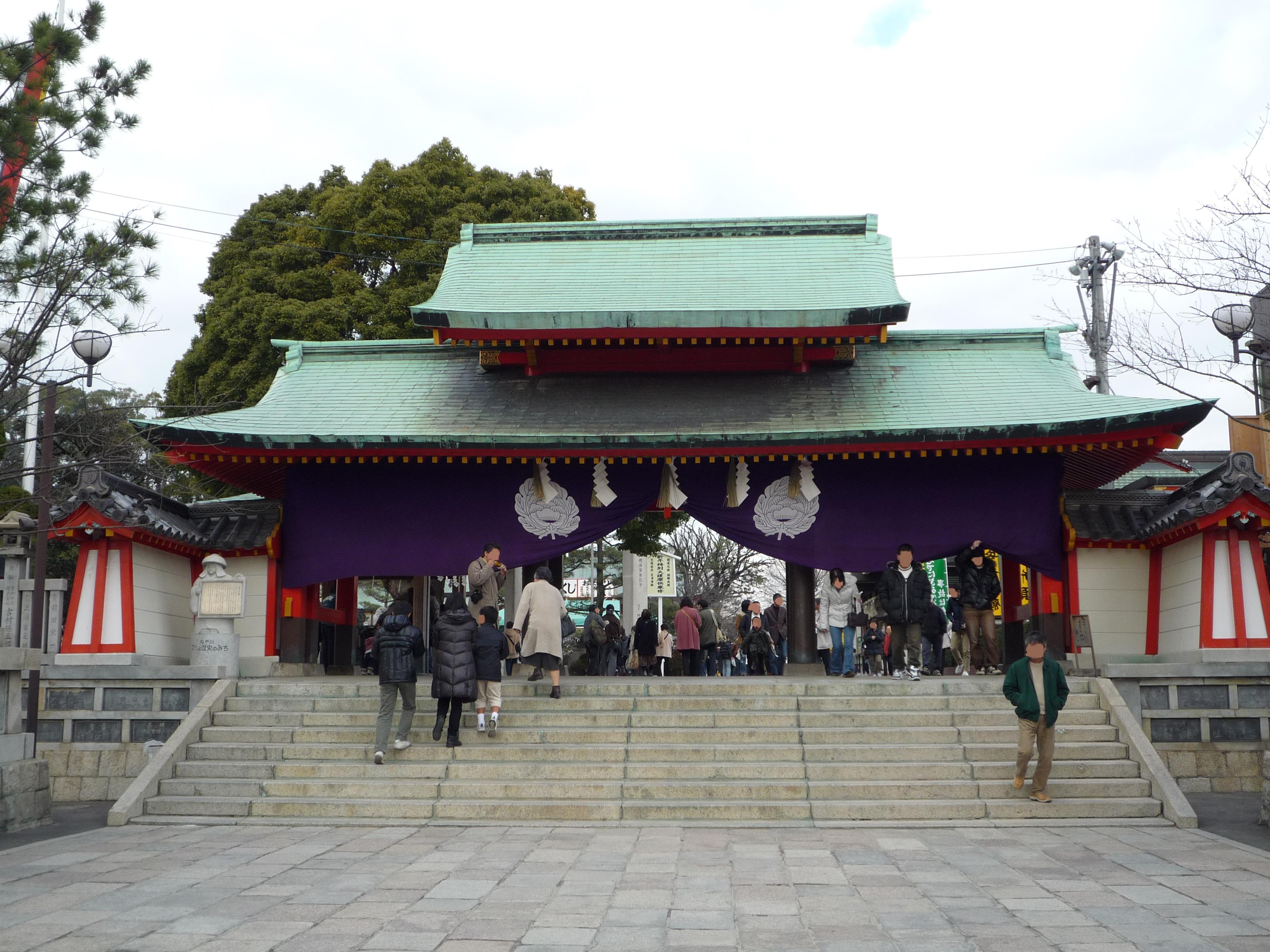 成田山不動尊山門